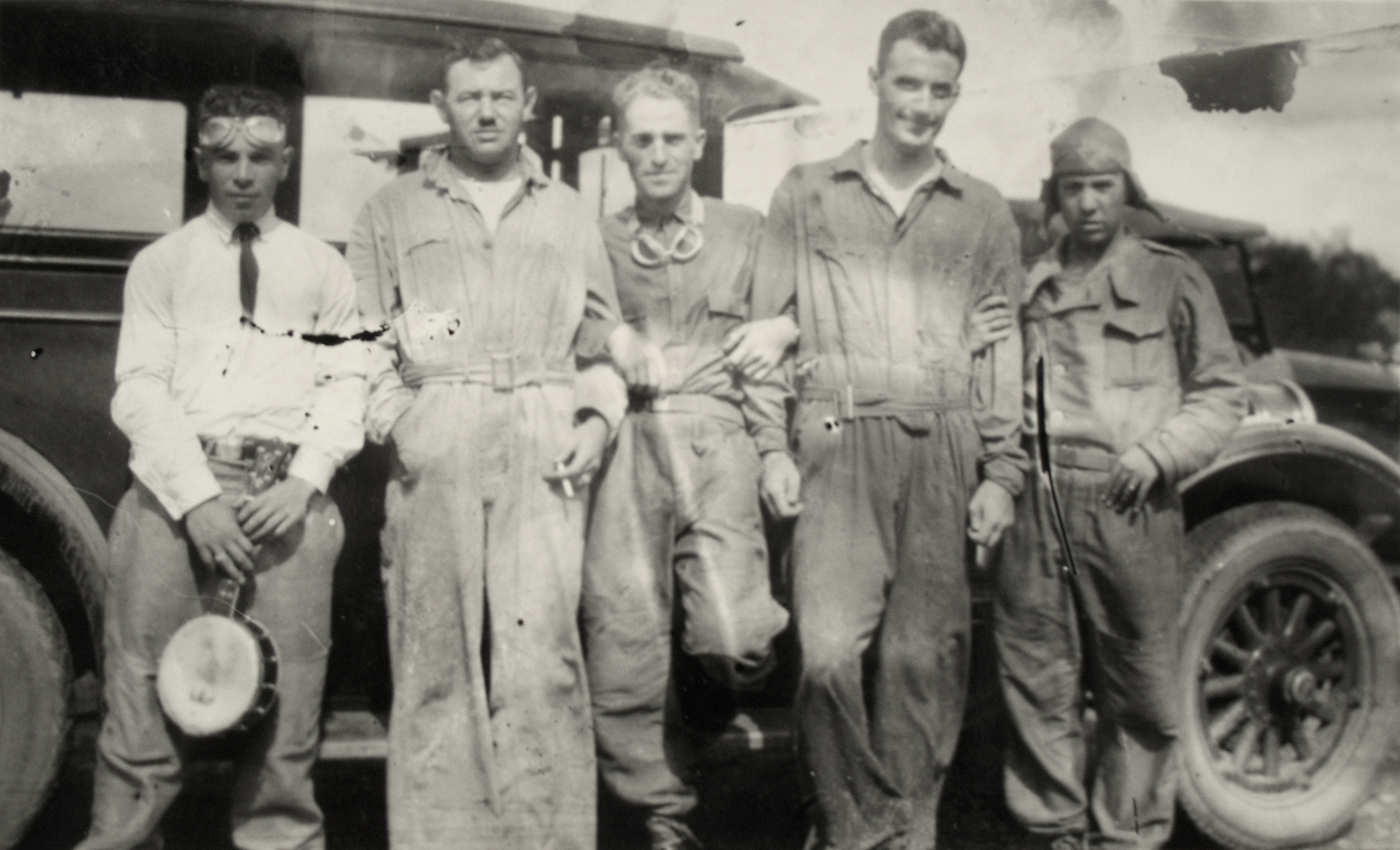 Mexican Air Force pilots. From L to R: Alfredo Lezama Alvarez, unknow, Luis Farell, unknow and Eliseo Martín del Campo. México, mid 1920s.